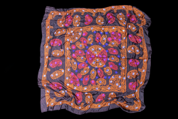 kalaghai